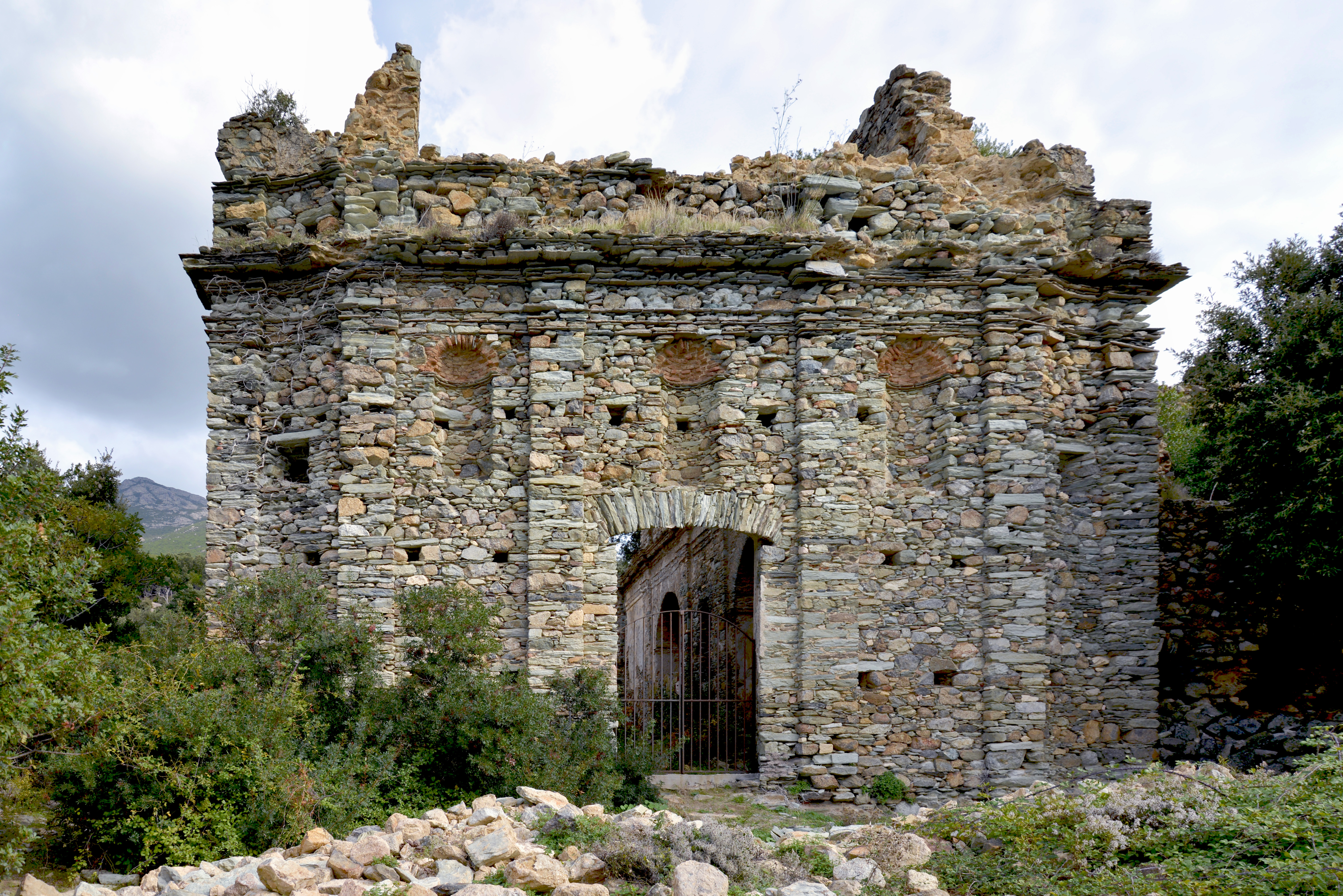 Farinole, Cap Corse - L'ancien couvent de Marianda, couvent Saint-François de l'Observance, fondé en 1606, a été fermé en 1792